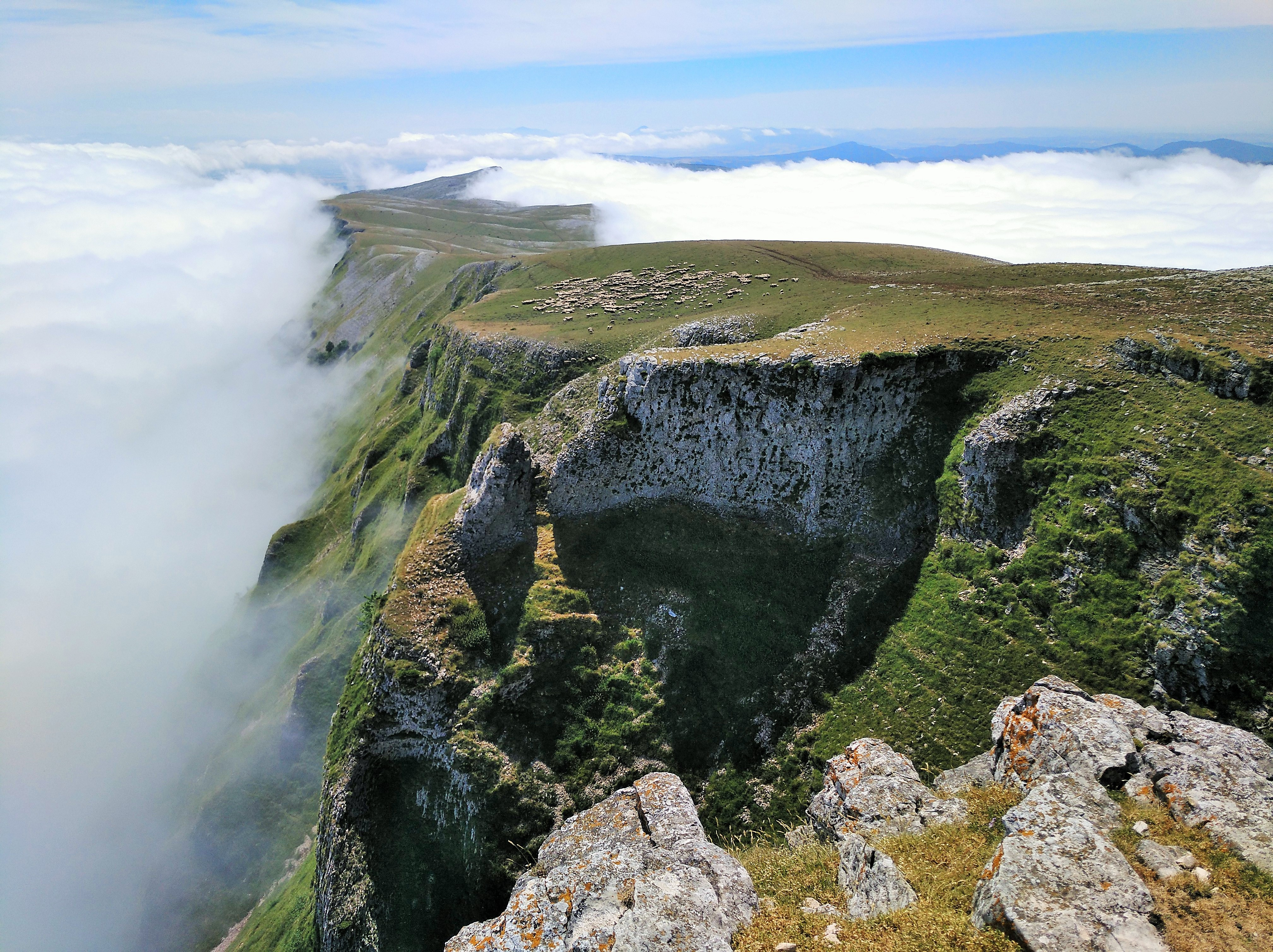 Andia mendizerra ekialderantz Beriaindik, laino artean